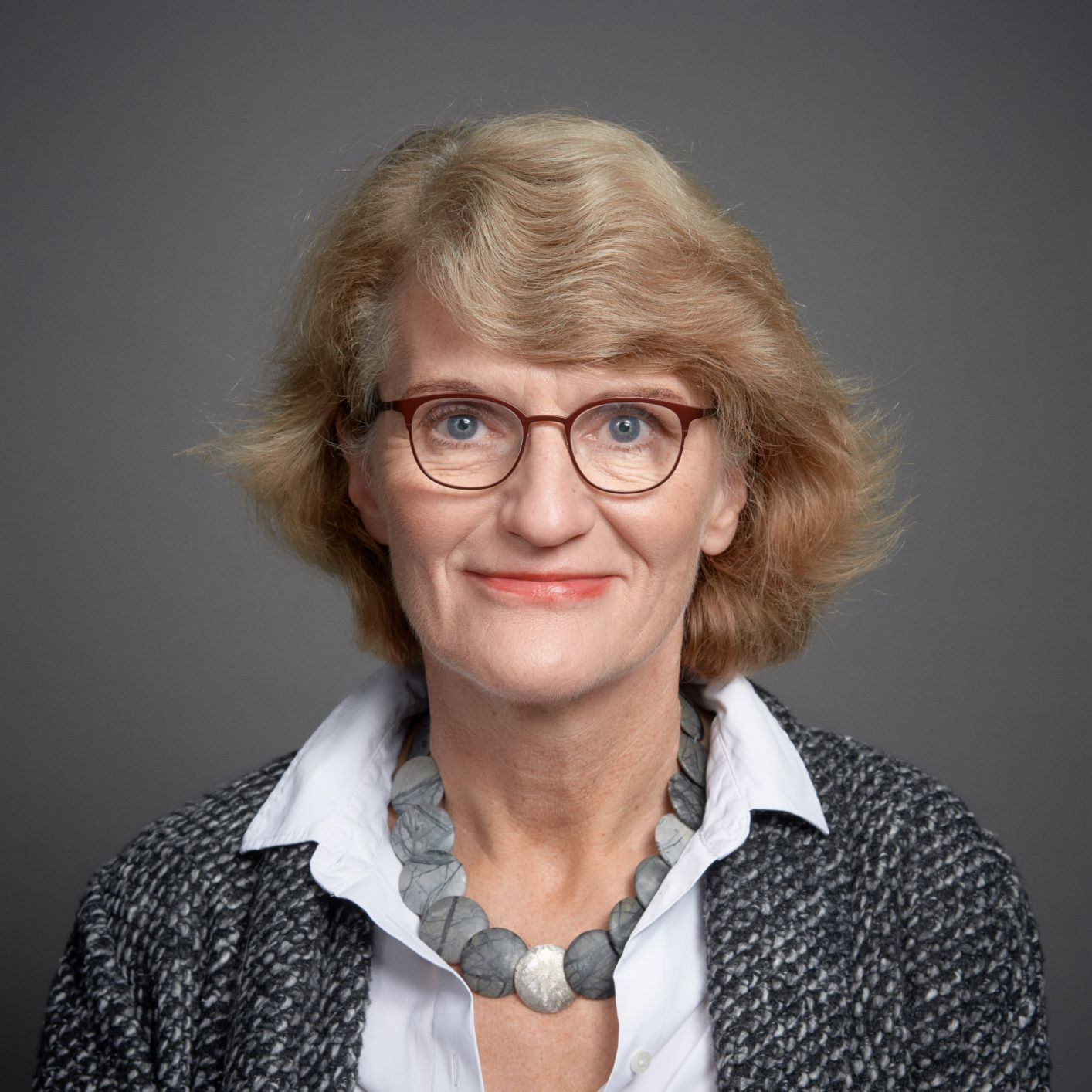 Porträt von Prof. Dr. Christa Dürscheid